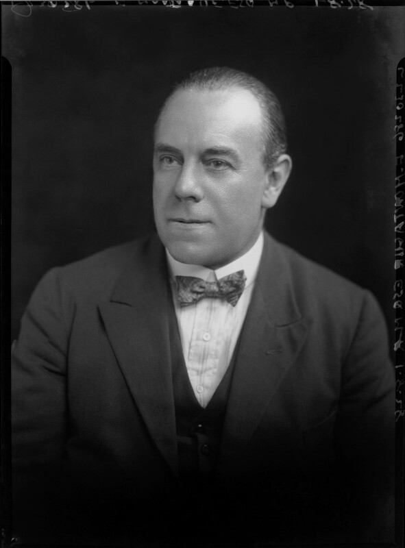 Lord Amwell